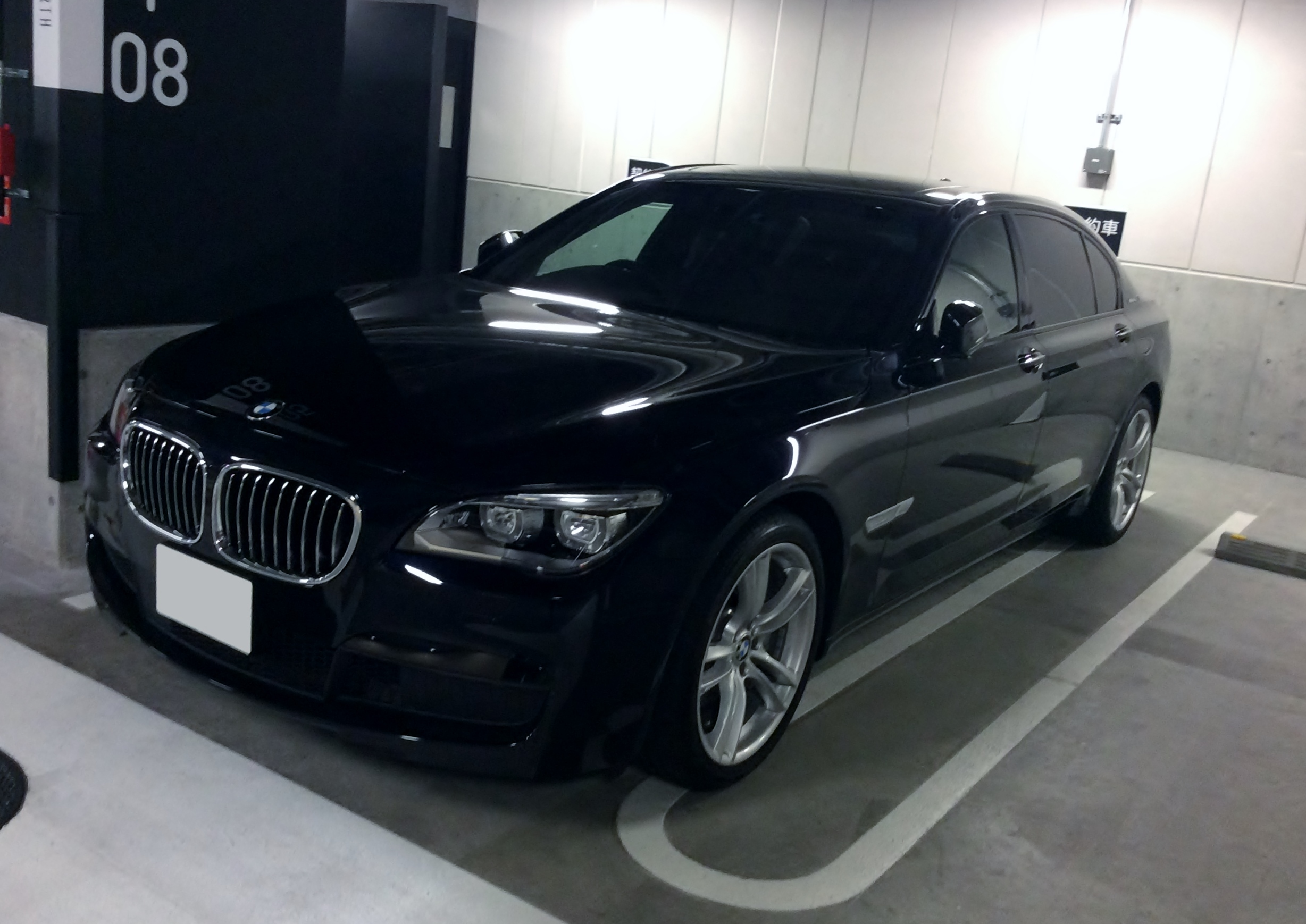 F01型BMW・ActiveHybrid 7 をフロントから撮影。